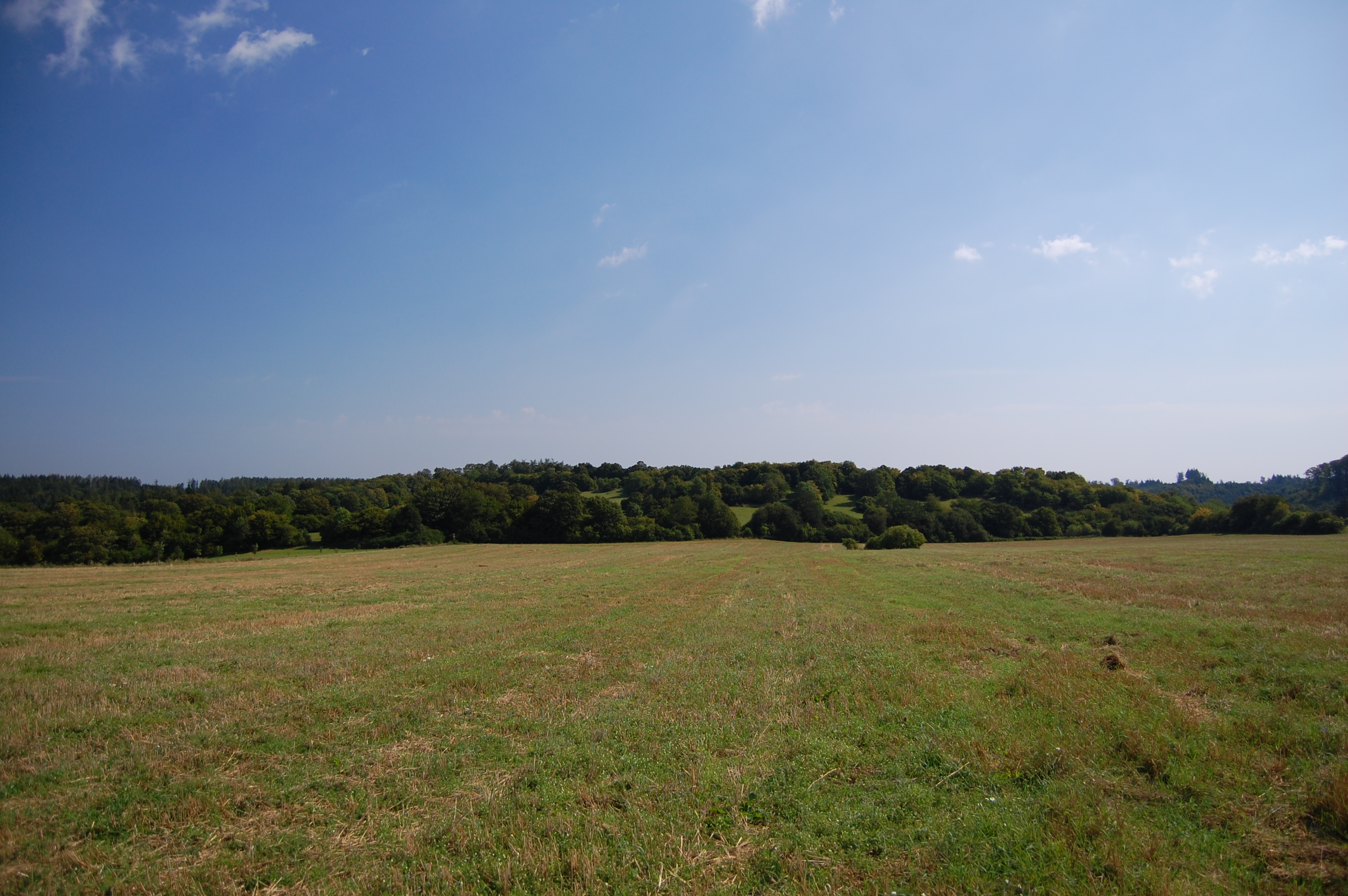 Celkový pohled na místo bývalého keltského oppida Staré Hradisko, Malé Hradisko, okres Prostějov